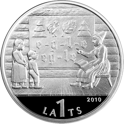 Lats commemorative coin